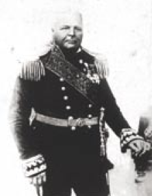 Vice Almirante Frederico Mariath, 1839